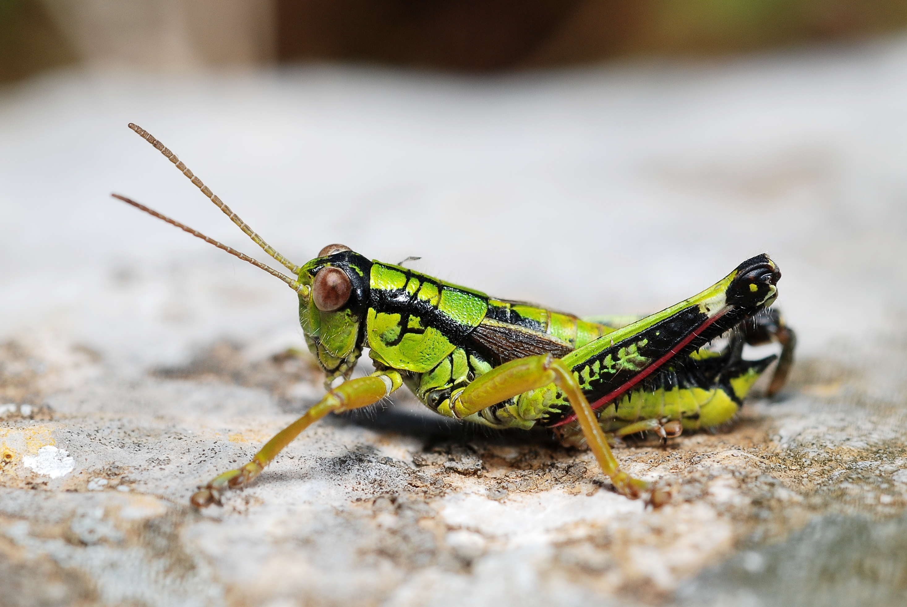 Miramella alpina male